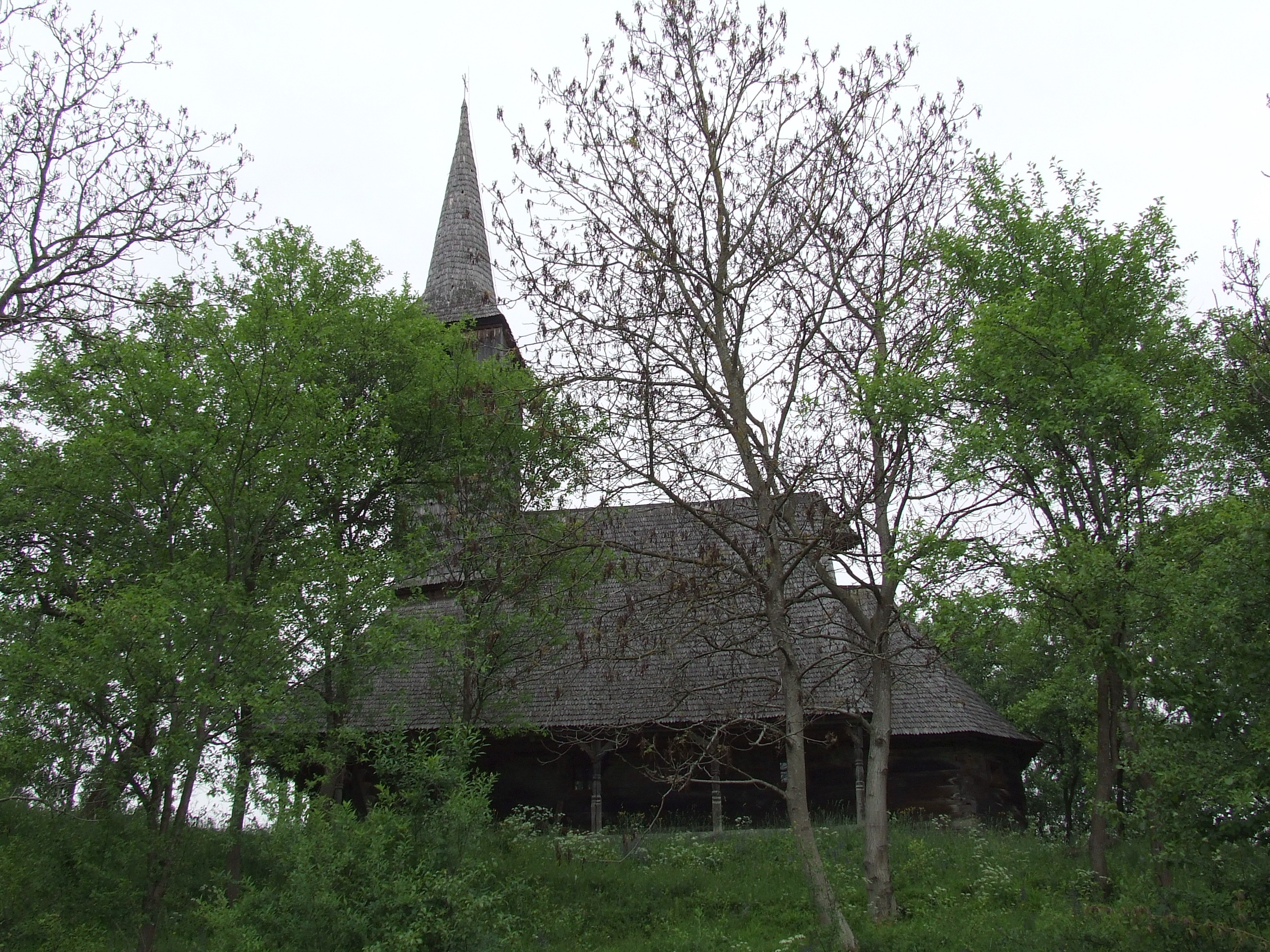 Biserica de lemn din Notig, judeţul Sălaj. Autor: Bogdan Ilieş Data: mai 2007